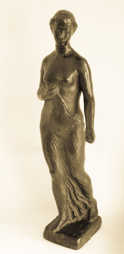 Carl Vilz: Flora (Bronzeskulptur, 1944)